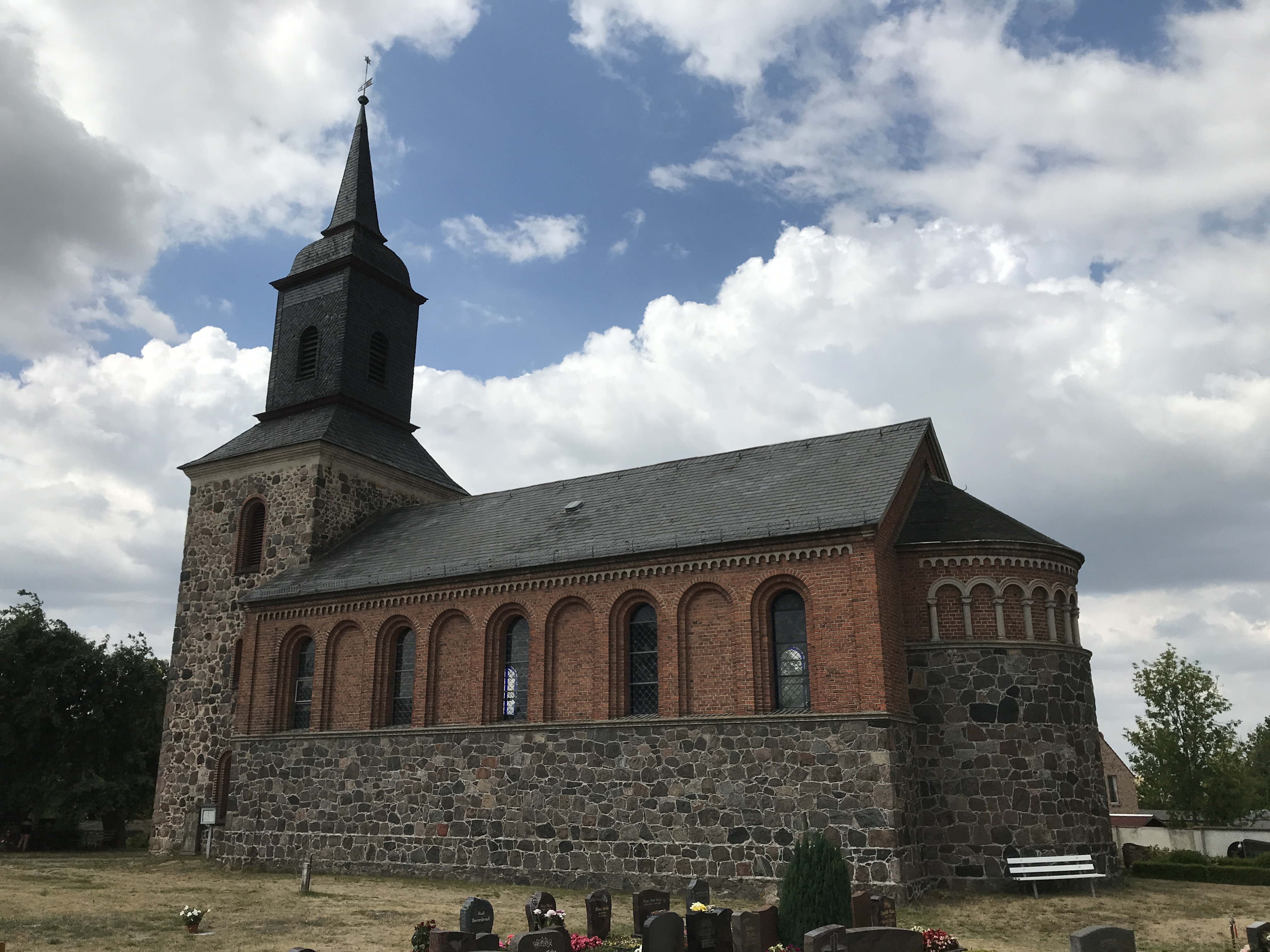 Die Dorfkirche Göhlsdorf der Gemeinde Kloster Lehnin entstand in den Jahren 1865 bis 1867 unter Einbeziehung des Turms des spätmittelalterlichen Vorgängerbaus. Die Kirchenausstattung stammt aus der Bauzeit.